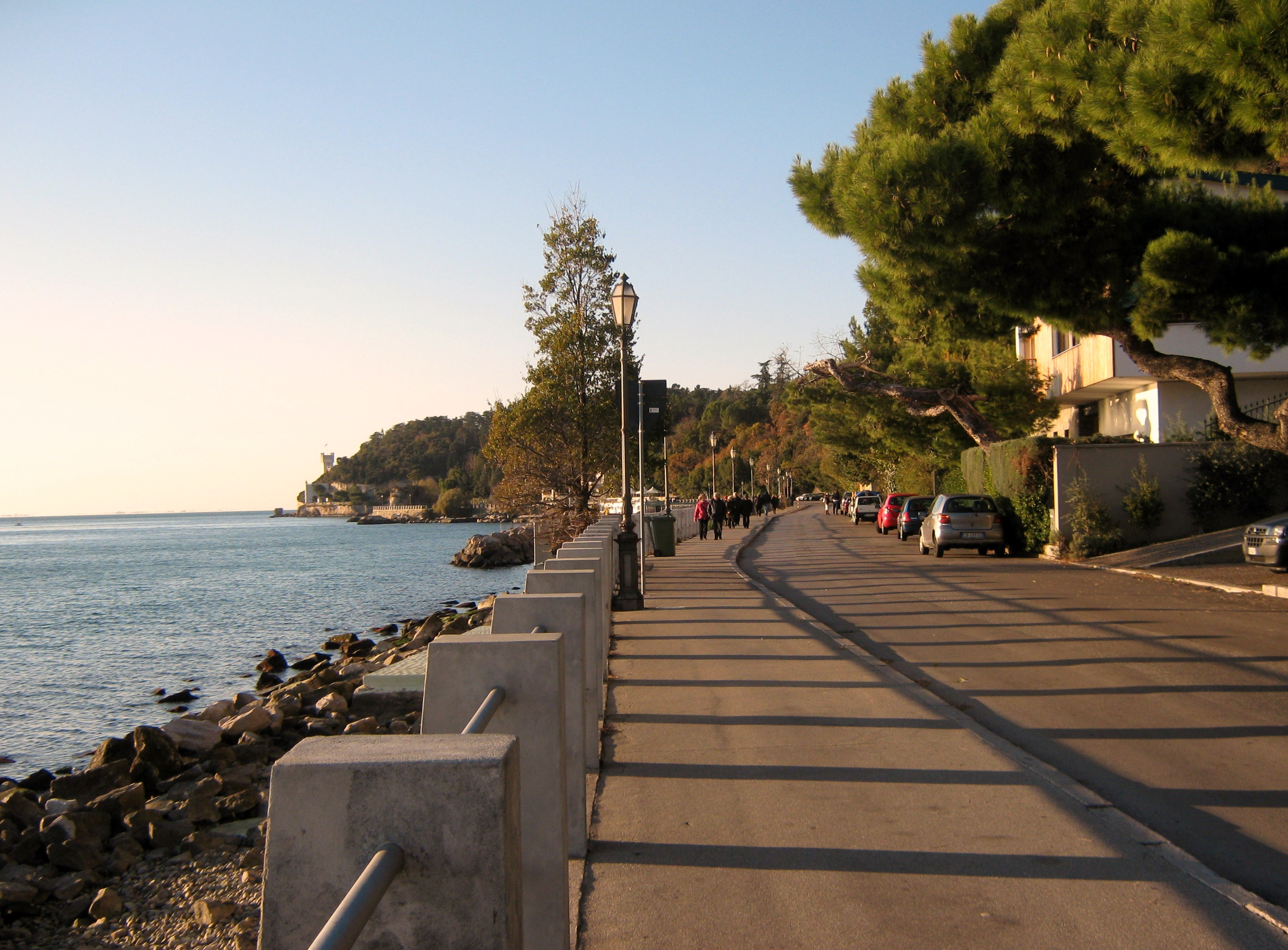 panorama"passeggiata di Miramare"sullo sfondo il Castello di Miramare